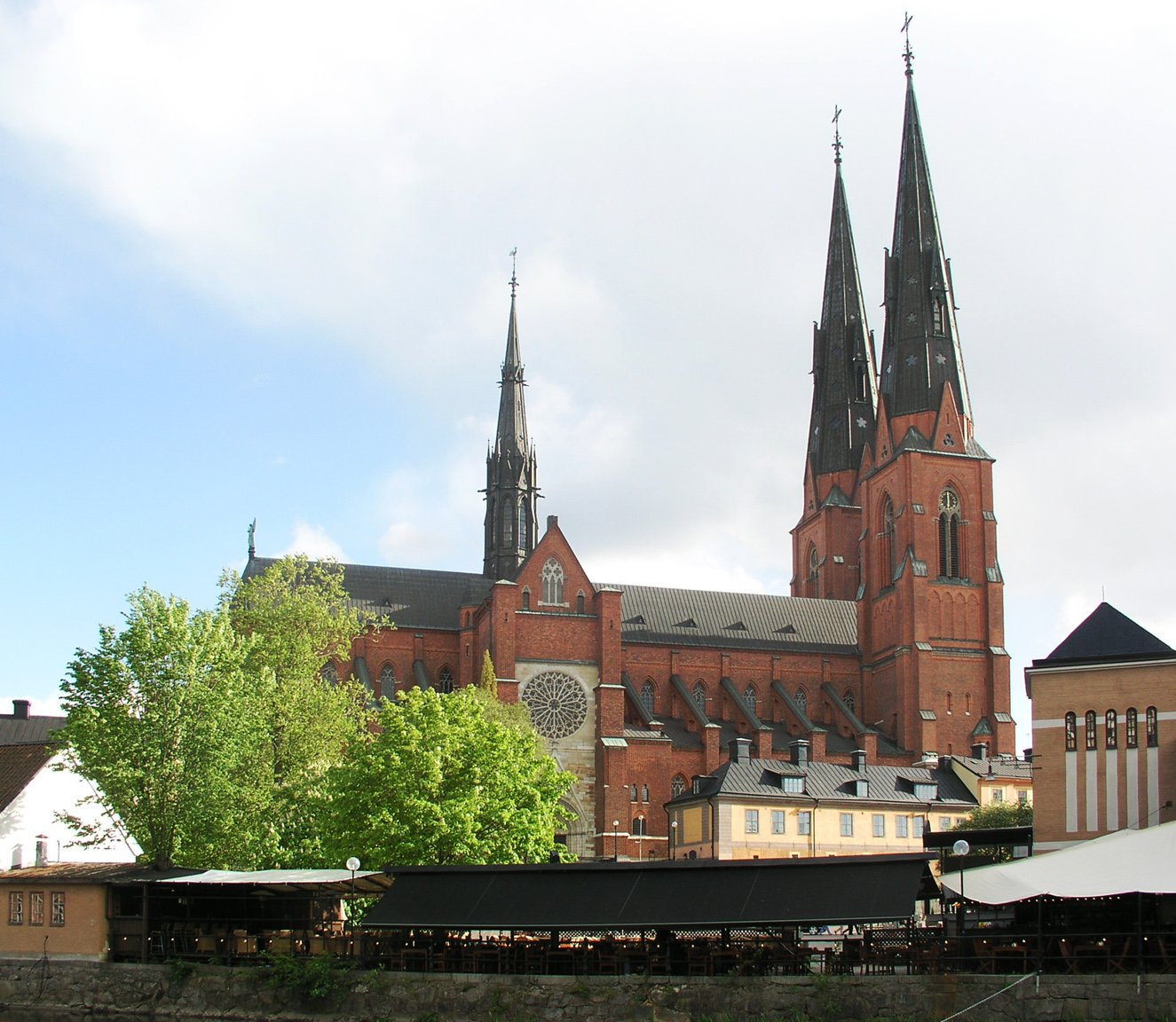 Uppsala domkyrka / Uppsala cathedral.